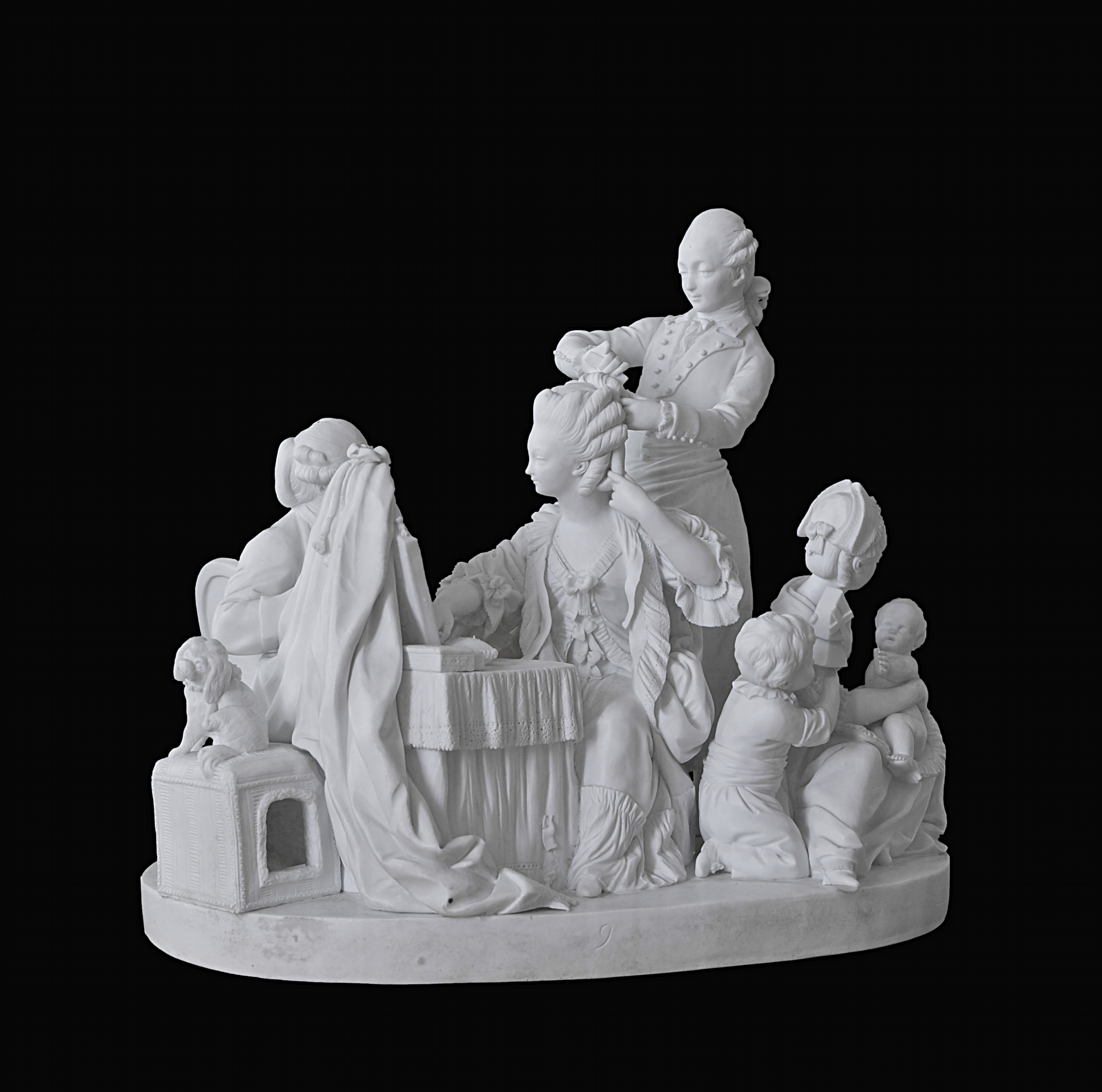 Surtout de table composé de trois pièces, ici : La Toilette